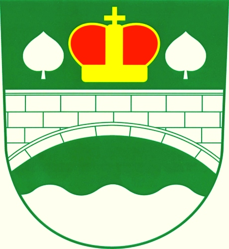 znak, Třebohostice, okres Strakonice